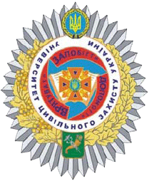 Емблема в.н.з. Національний університет цивільного захисту України